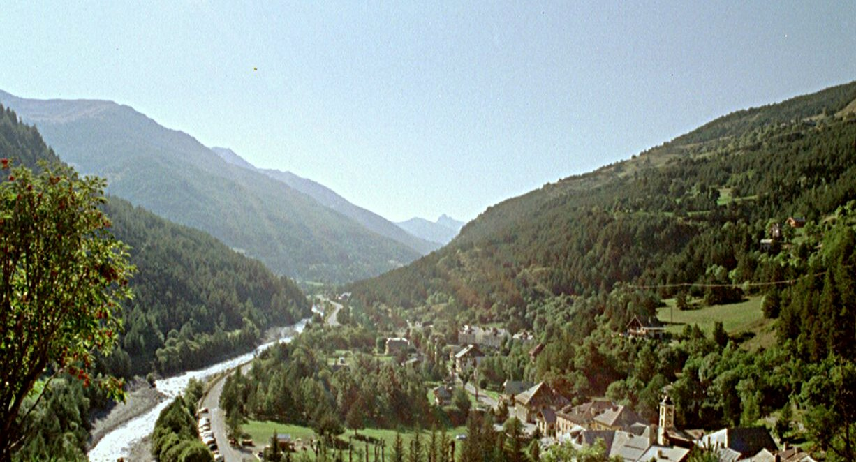 Abries in het dal van de Queyras, door mij gefotografeerd in juni 2002.